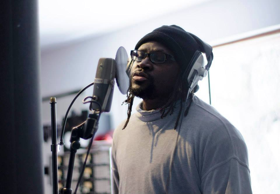 sesja nagraniowa albumu "Umbada" zespołu Mamadou & Sama Yoon w Studio Srebrna latem 2015 r.